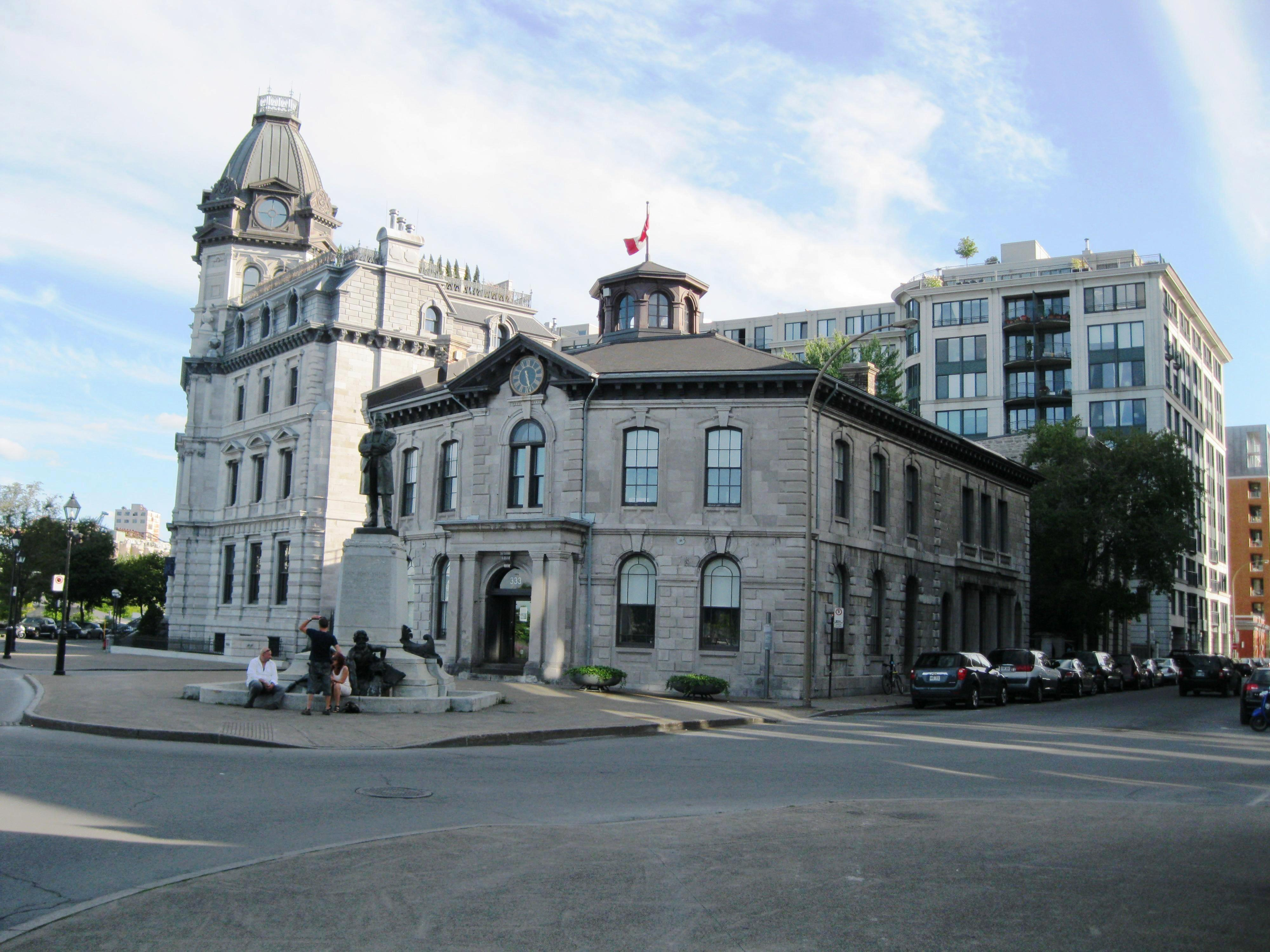 Au centre-droite : Édifice Allan, 333, rue de la Commune Ouest, Montréal Vieux-Montréal À gauche : Édifice des Commissaires, 357, rue de la Commune Ouest, Montréal (Québec, Canada)